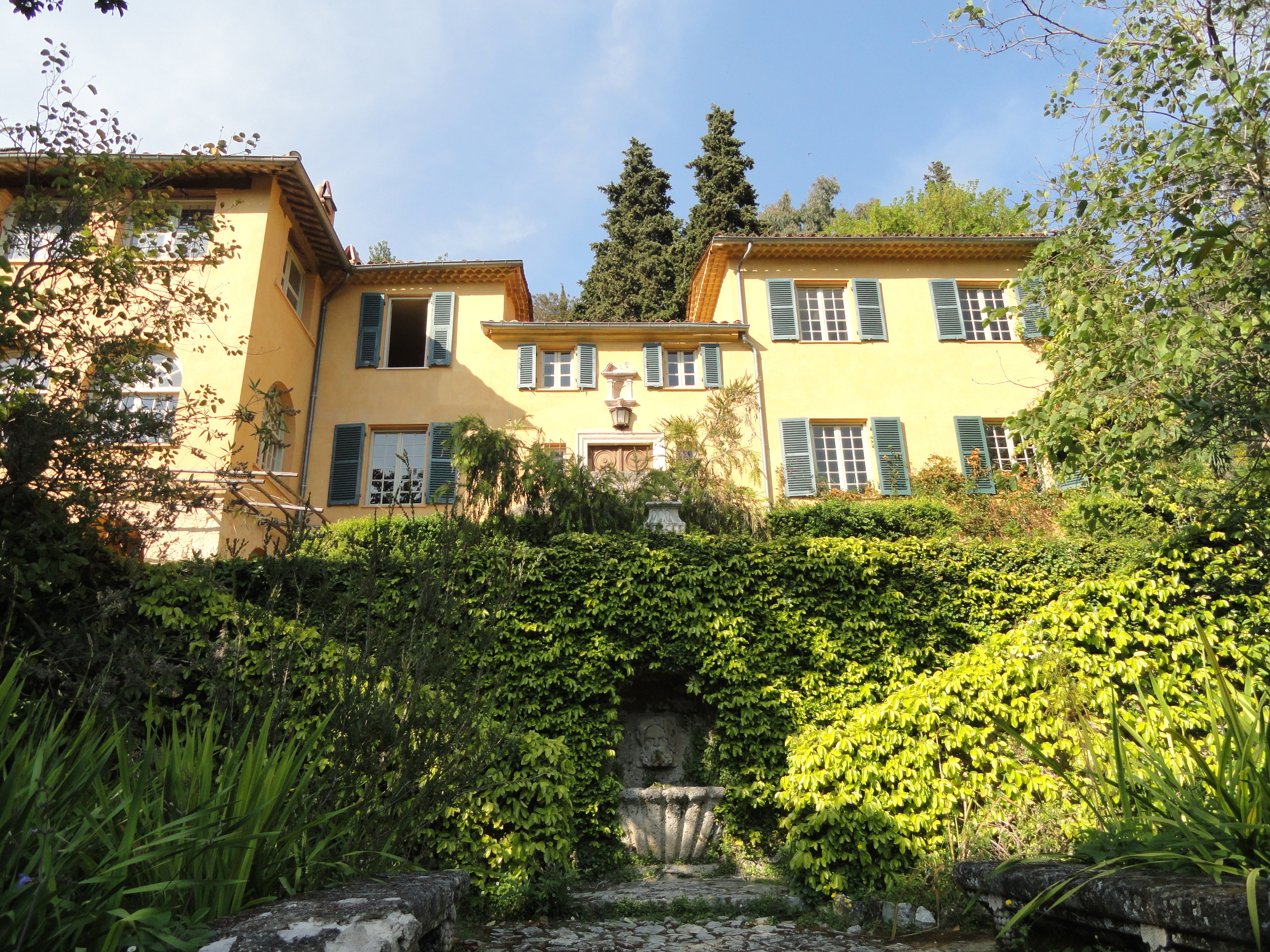 Jardin Serre de la Madone, Menton, Alpes-Maritimes, France.